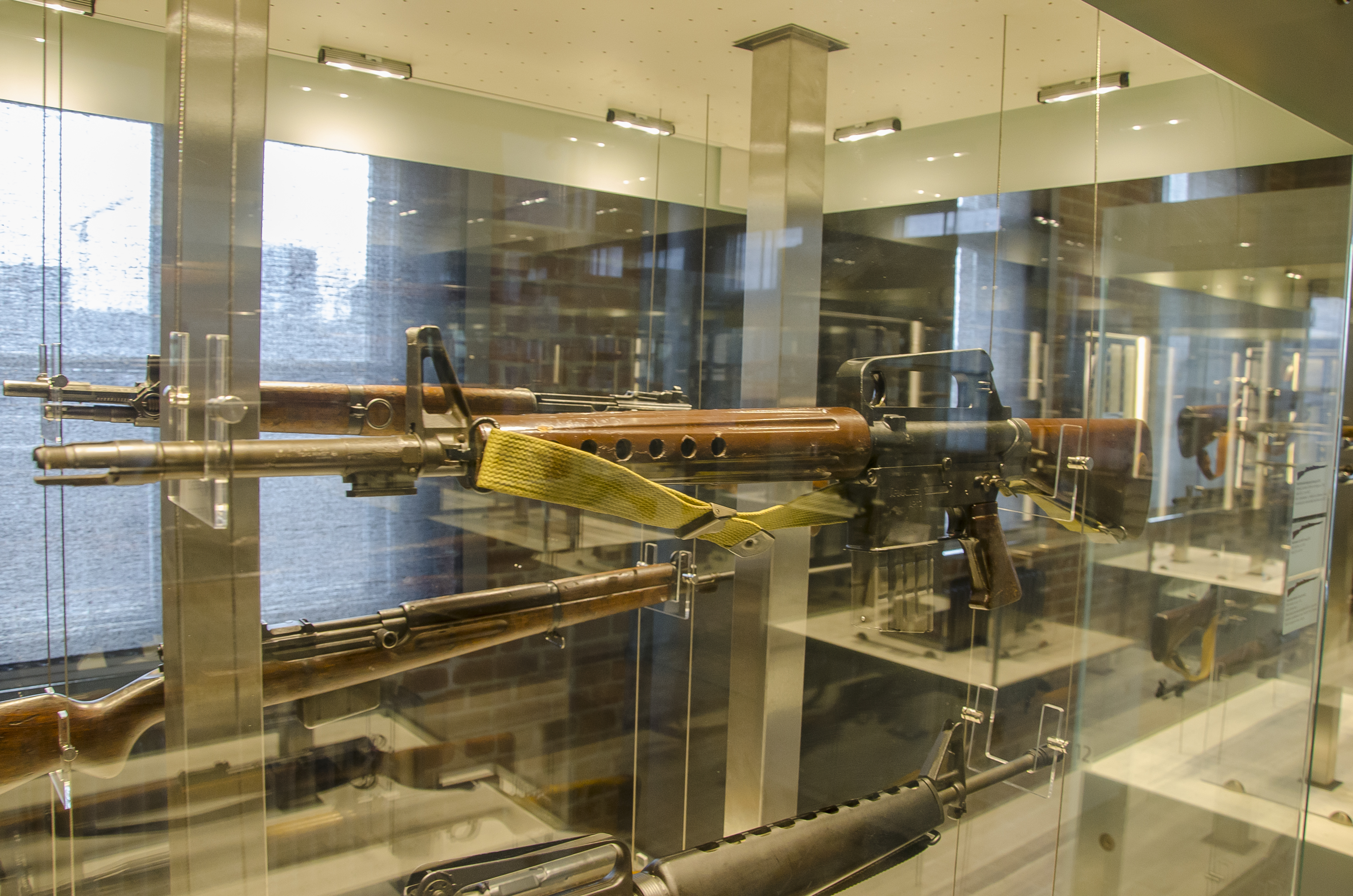 Warszawskie, Kraków, Poland